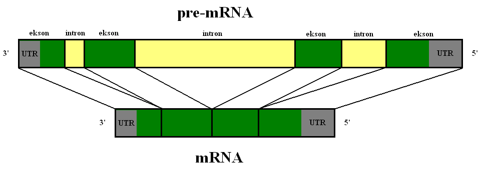 spleising bilde